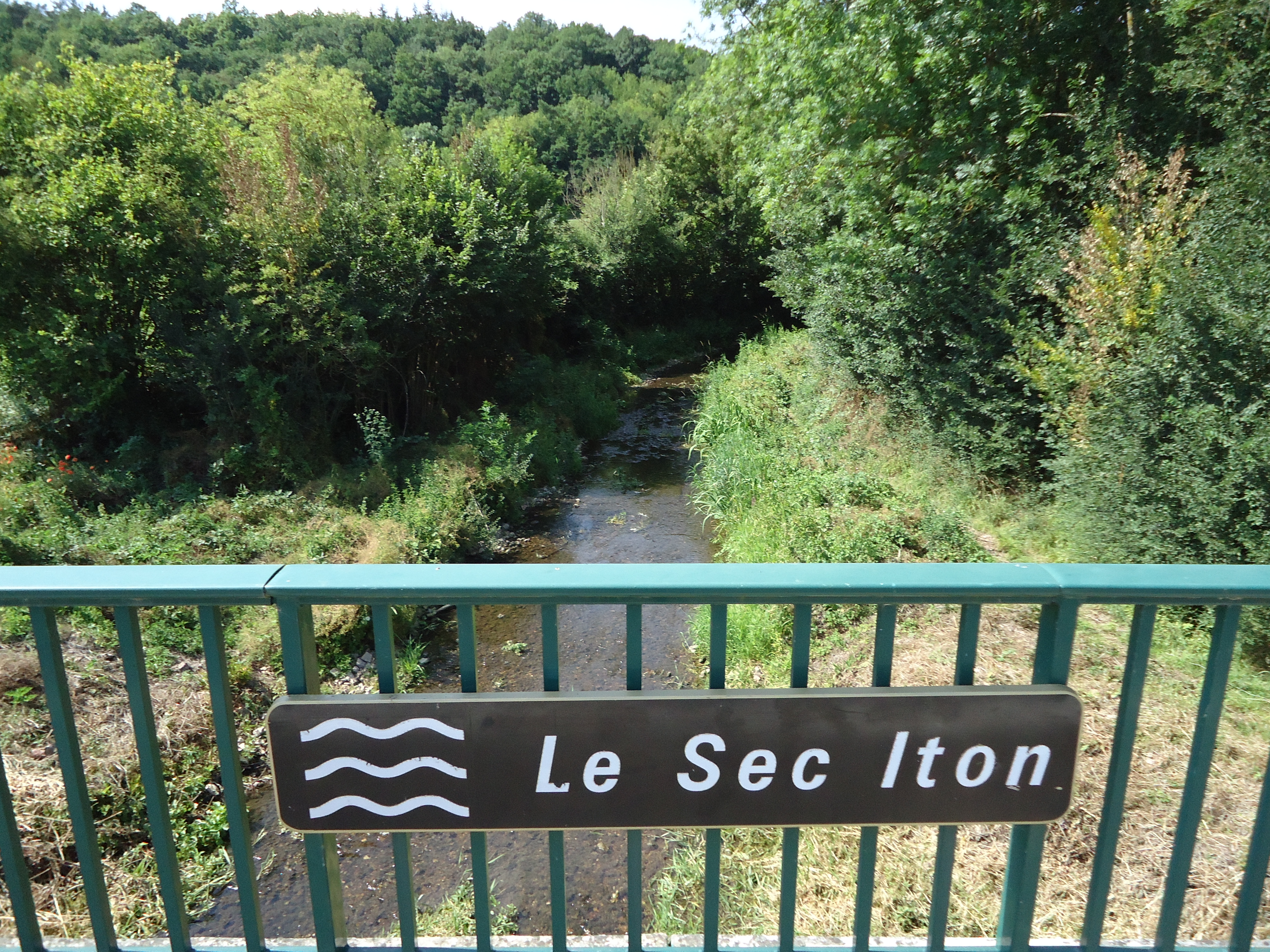 Le pont du Sec-Iton - Gaudreville-la-Rivière - Eure (27)